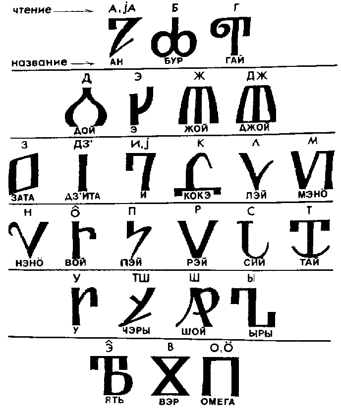 Зырянский (коми) алфавит, созданный свт. Стефаном Пермским.